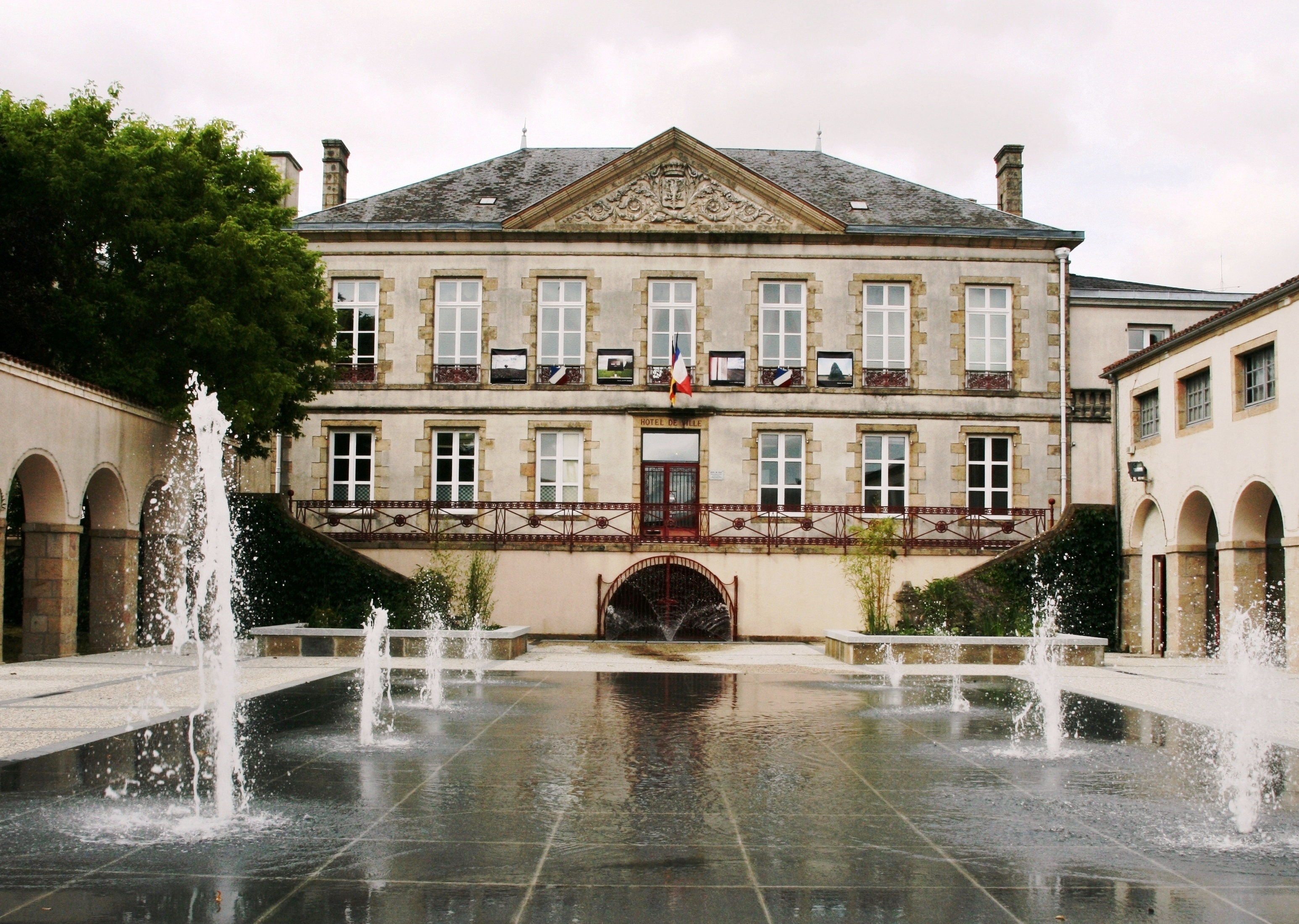 Français